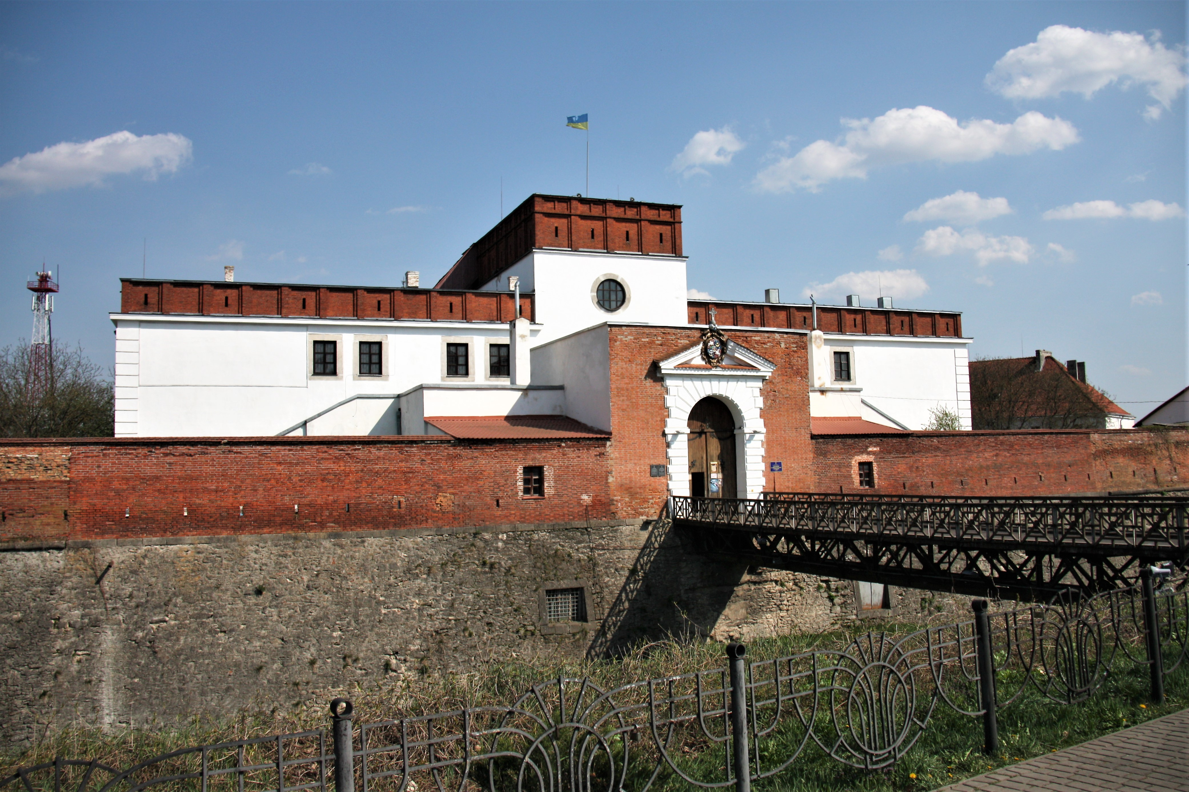 Надбрамний корпус (мур.), Дубно, вул. Шевченка